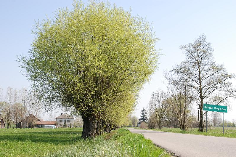 Księże kopacze gmina Szczurowa